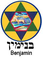 Símbolo da tribo de Benjamin